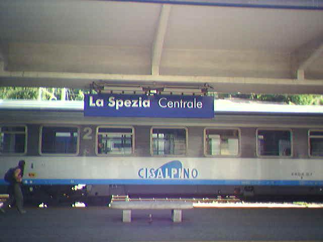 Stazione Ferroviaria di La Spezia Centrale - La Spezia - Italia